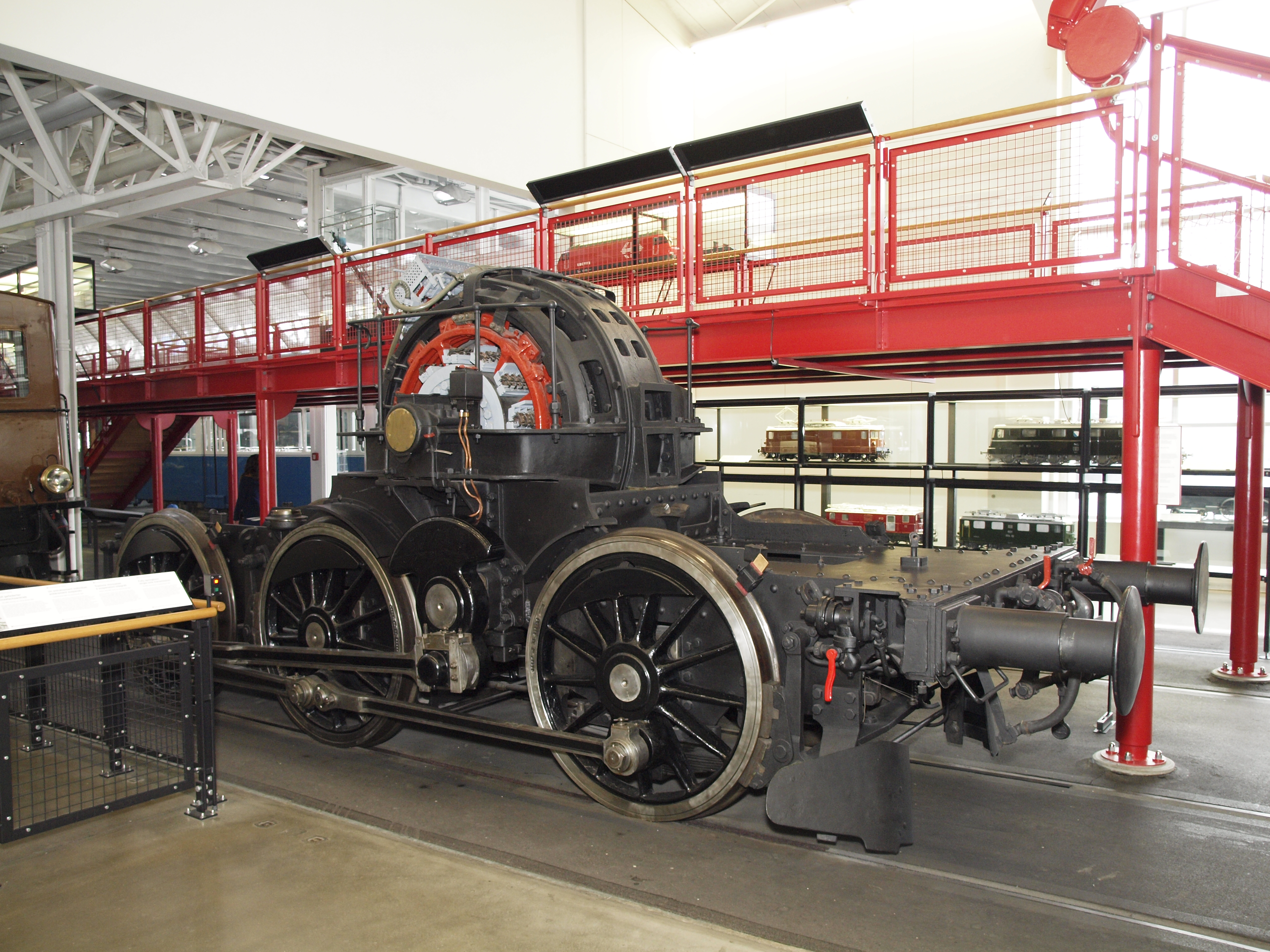 Das erhaltene Drehgestell der BLS Ce 6/6. Dies ist im Verkershausluzern in der Dauerausstellung ausgestellt. Es handelt sich hierbei um ein 1910 von der Machienenfabrick Oerlikon angefertigtes Drehgestell